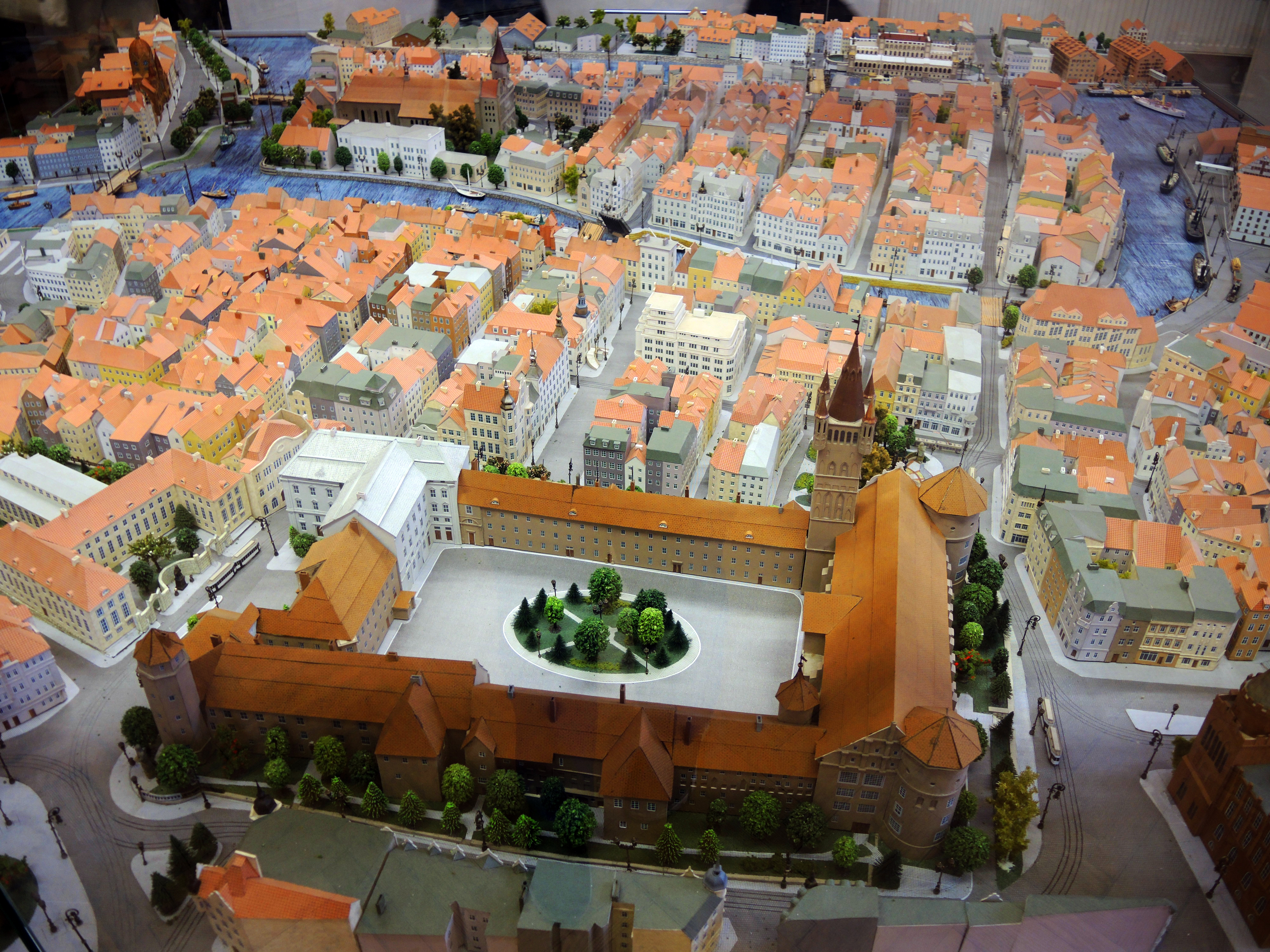 Кафедральный собор: остров Канта, Калининград, Калининградская область